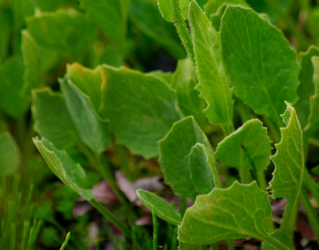 Doronicum_clusii (Doronico del granito) Località : "Giardino Botanico delle Alpi Orientali", Monte Faverghera (BL), 1500 m s.l.m.